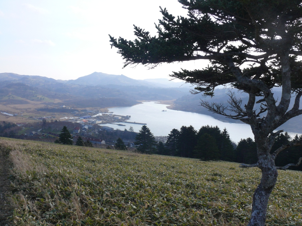 Вид на село Крабозаводское. о. Шикотан